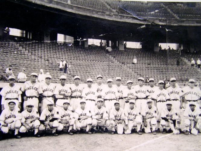 元プロ野球選手望月潤一保管のプロ野球チーム（イーグルス）の集合写真。望月は後列左から7人目。右端は日本プロ野球外国人選手第一号のハリス。本人没後、長男が保管。望月潤一来歴説明の補足として提供。